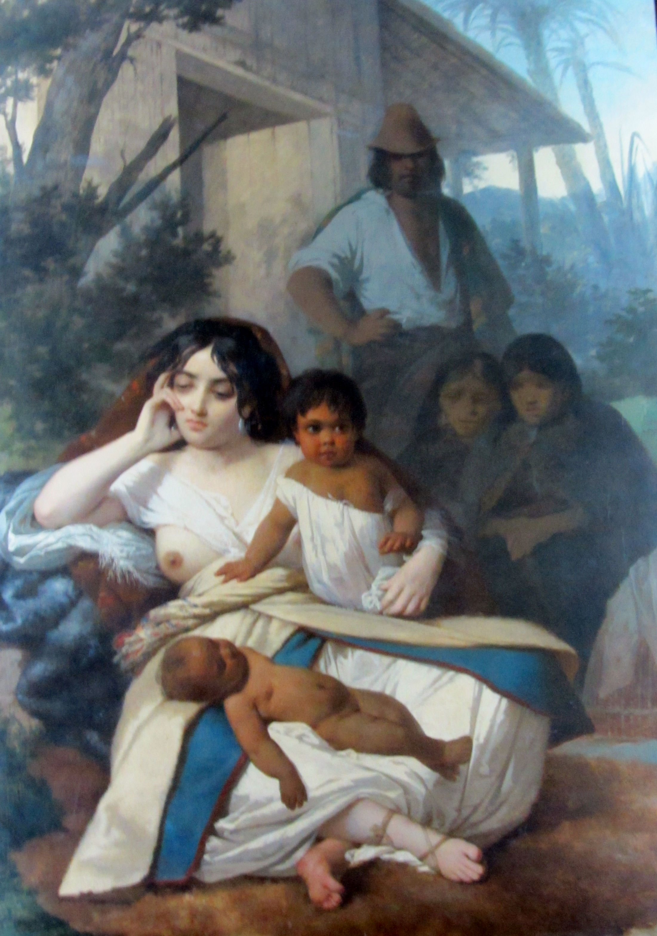 Elisa Bravo Jaramillo iba en el bergantín el Joven Daniel, que había zarpado de Valparaíso el 23 de julio rumbo a Valdivia y que naufragó a la altura de la desembocadura del río Toltén, en la playa de Puancho, costa de Cautín, zona del lago Budi. Sucedió en la noche del 31 de julio al 1 de agosto de 1849; culparon a los mapuches de haber raptado a Elisa, que habría sobrevevido al naugragio y pasado a ser mujer del cacique Kurín o Curín. La leyenda dice que los sobrevevientes levantaron un campamento en la playa, pero que pronto fueron matados por los indios. Según algunos historiadores modernos, como Sergio Villalobos, Premio Nacional de Historia (Chile), en realidad, no hay pruebas de que hubiera sobrevivientes ni de que Elisa no hubiera perecido y estuviera efectivamente cautiva en la Araucanía (véase Vida fronteriza en la Araucanía; el fragmento sobre el naufragio puede consultarse en Google Books. Monvoisin pintó otro cuadro sobre el tema: El naufragio del 'Joven Daniel'.